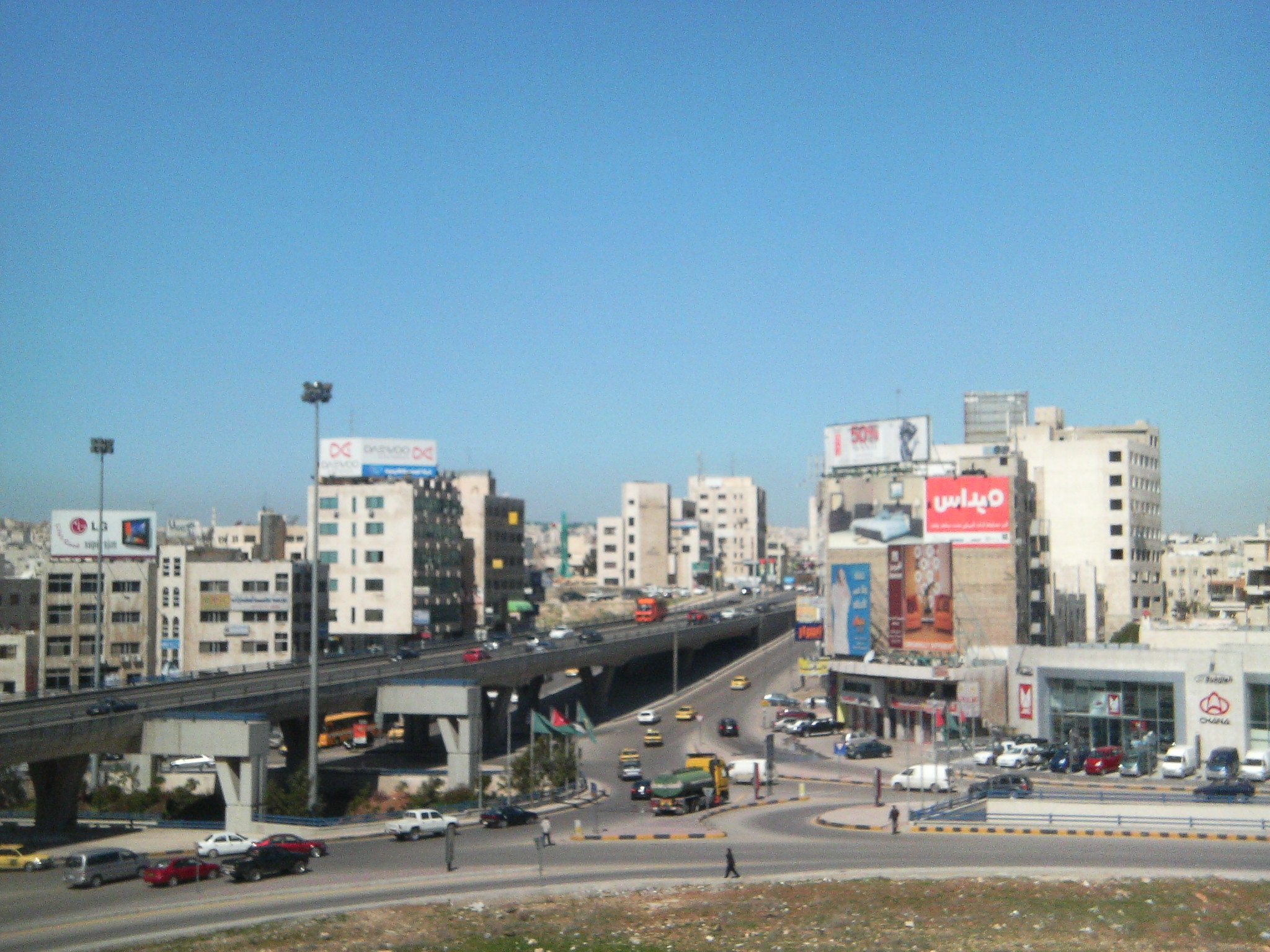 haramain sq - amman